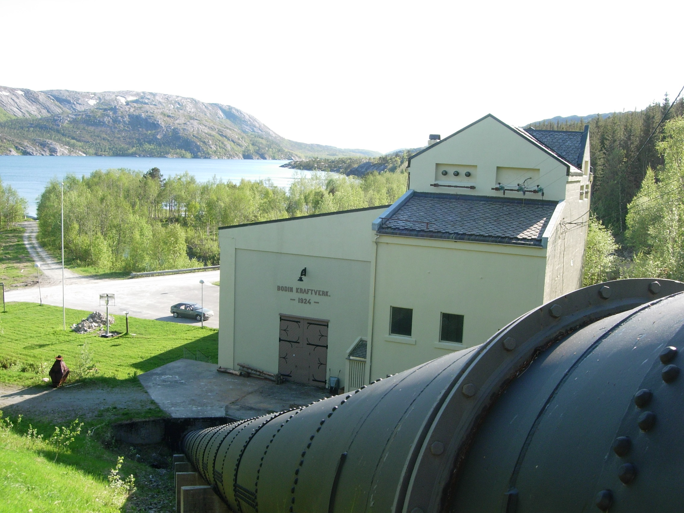 Heggmoen kraftverk in Bodø, Norway (Vatnvatnet in the background)